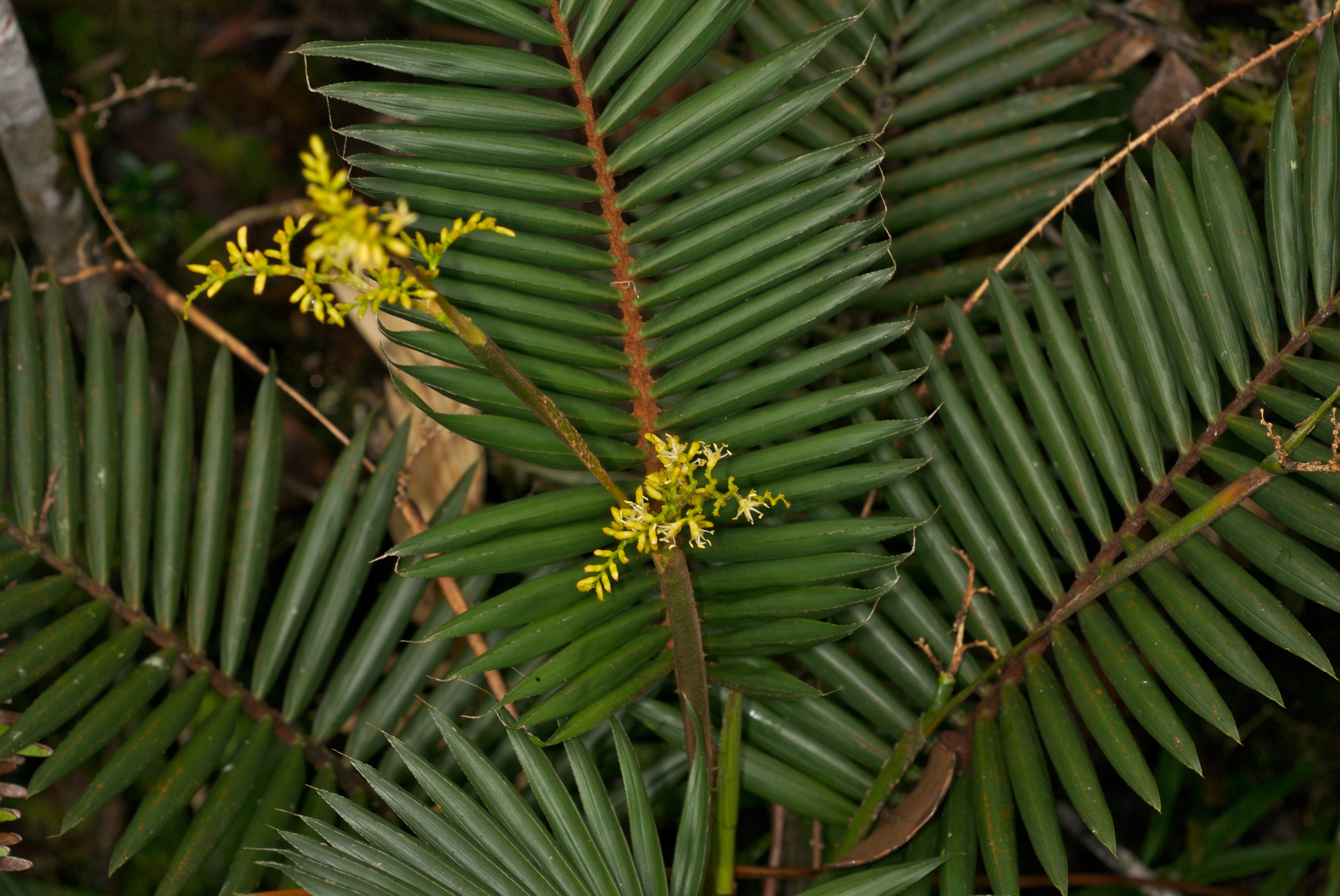 Calamus gibbsianus photographed on Mount Kinabalu, Sabah, Malaysia, Borneo